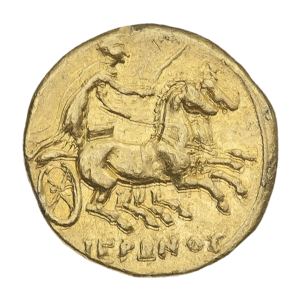 Сицилия. Сиракузы. Гиерон II (275—215 гг. до н.э.). Золотая драхма (декадрахма). Ок. 269—215 гг. до н.э. Реверс. Бига, вправо. Под обрезом надпись IEPΩΝΟΣ.